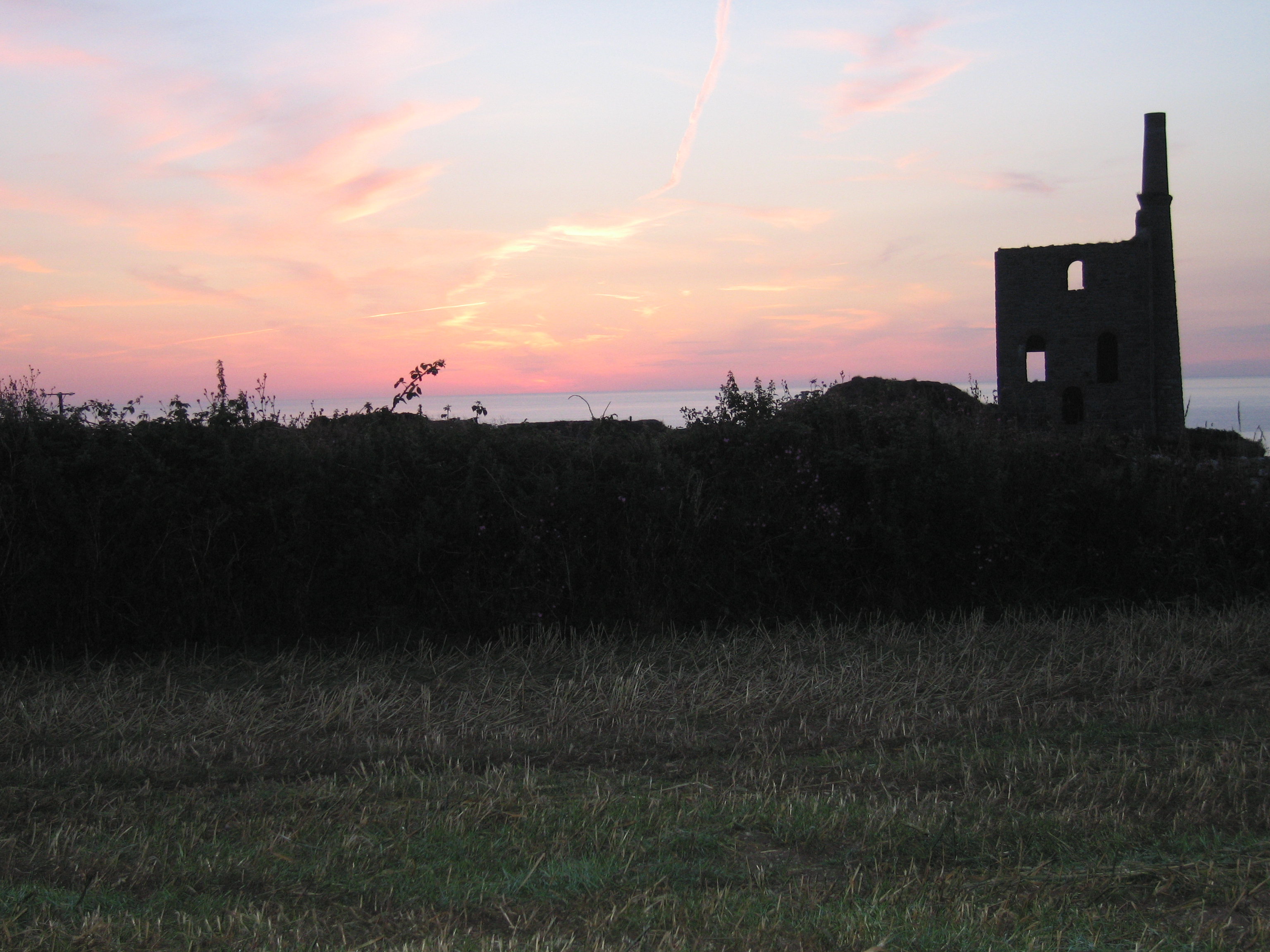 Old tin mine workings near Pendeen in Cornwall